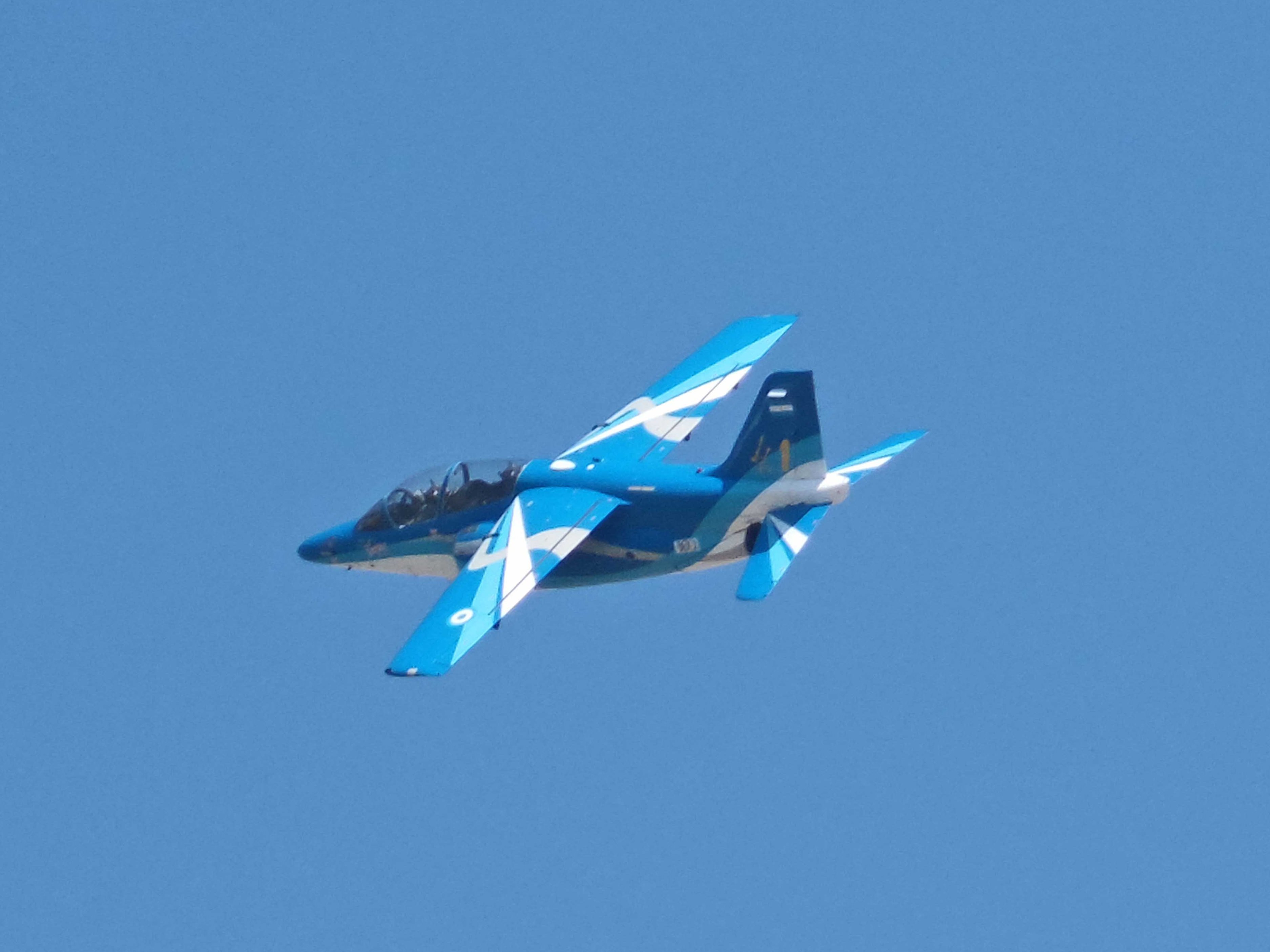 IA-63 Pampa en FIDAE 2014